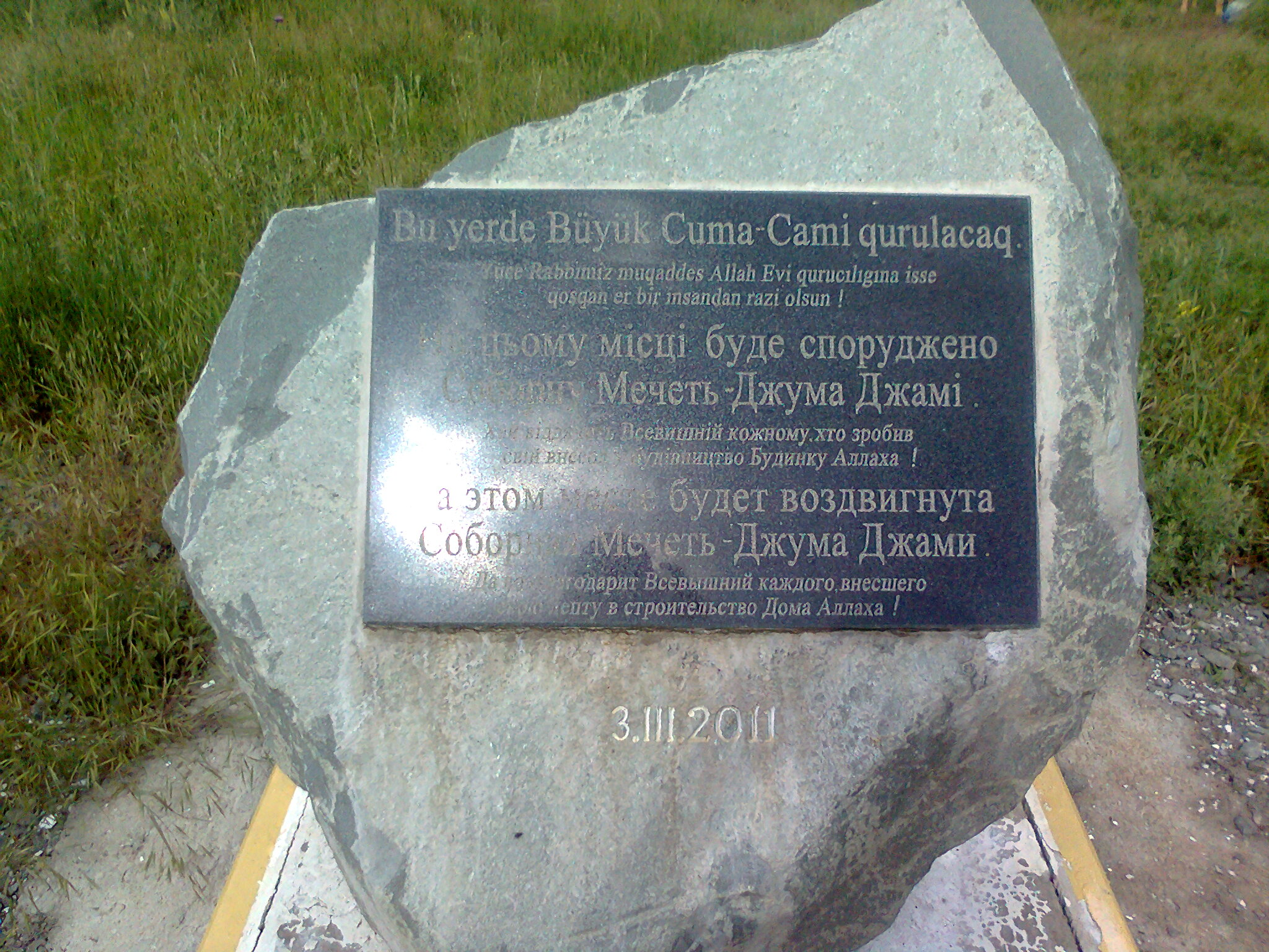 Мечать Джума Джами